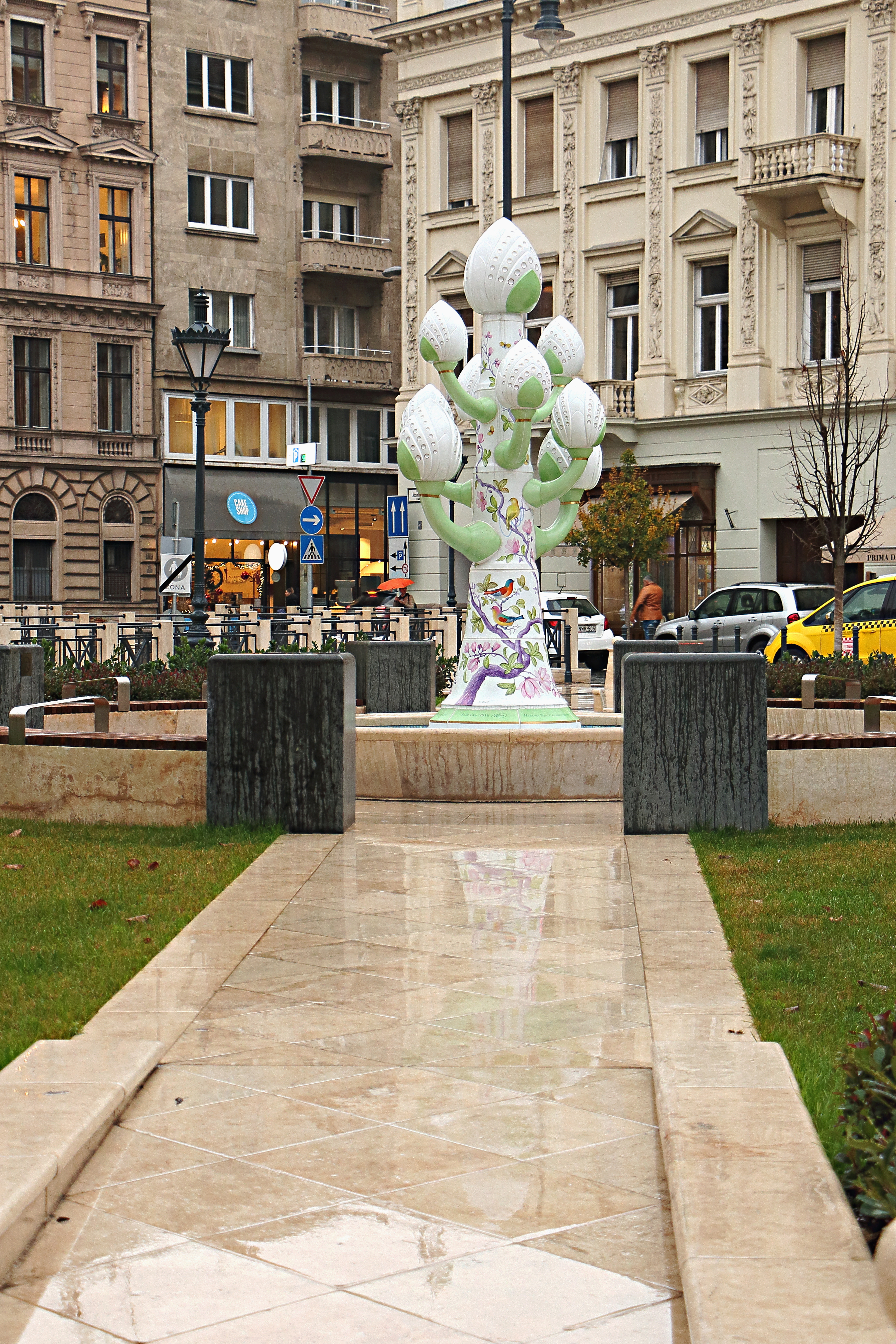 Az "Élet fája" (Meixner Etelka (tervező), Vida Sándor (festőművész)) Herendi-díszkút a József nádor téren